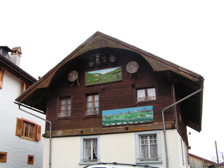 Poya : Estavannens, Fribourg, Switzerland.